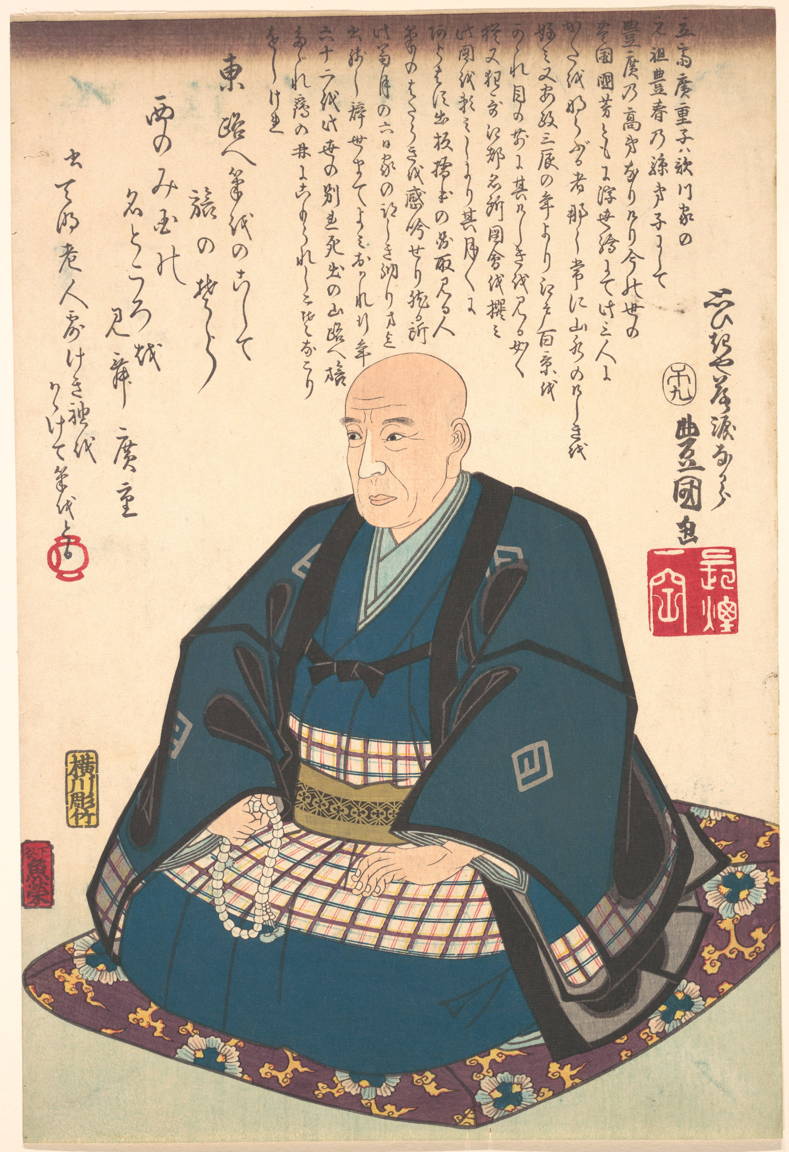 Japan; Print; Prints